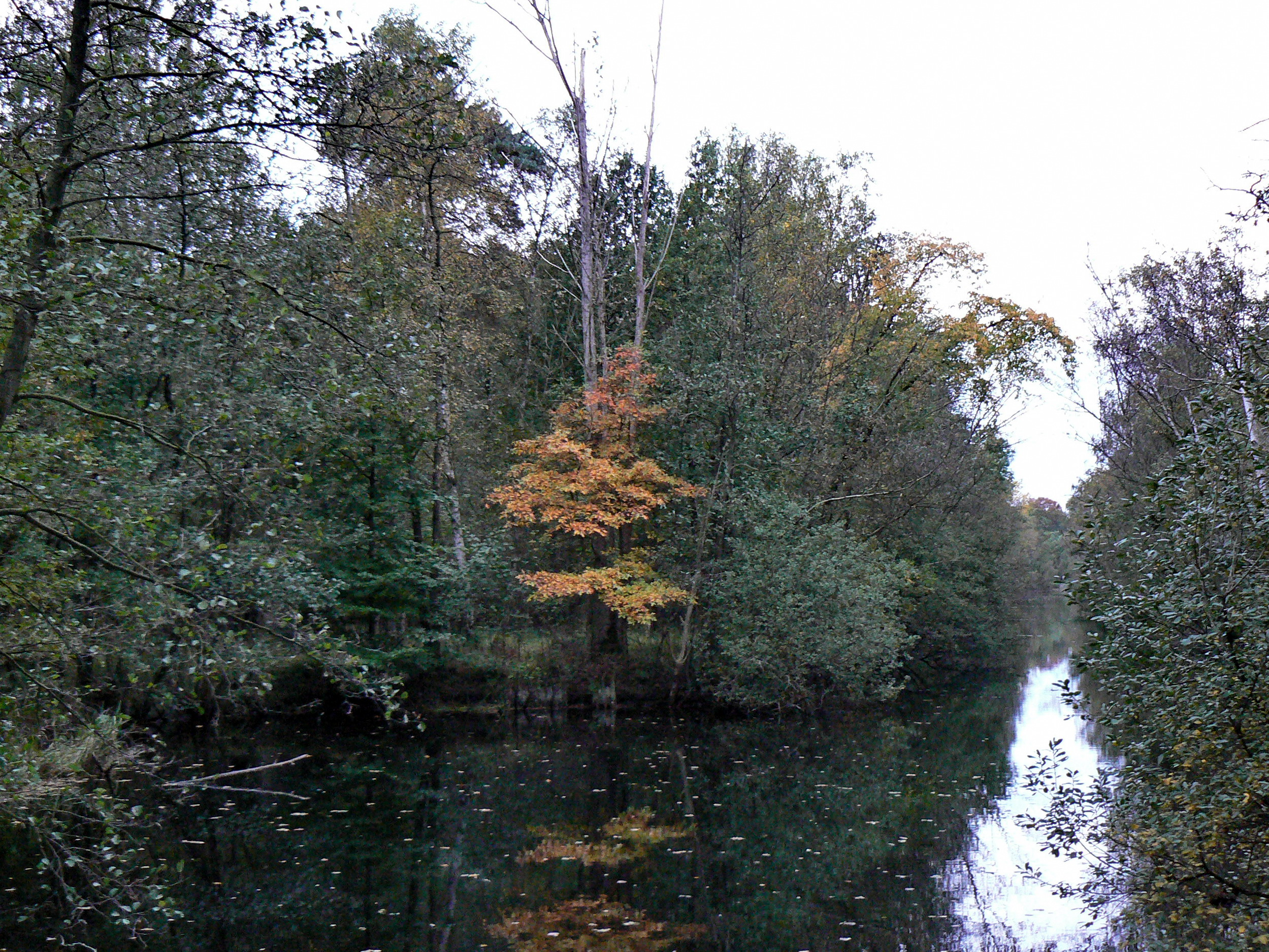 Antitankgracht, De Inslag, Brasschaat (Belgium)